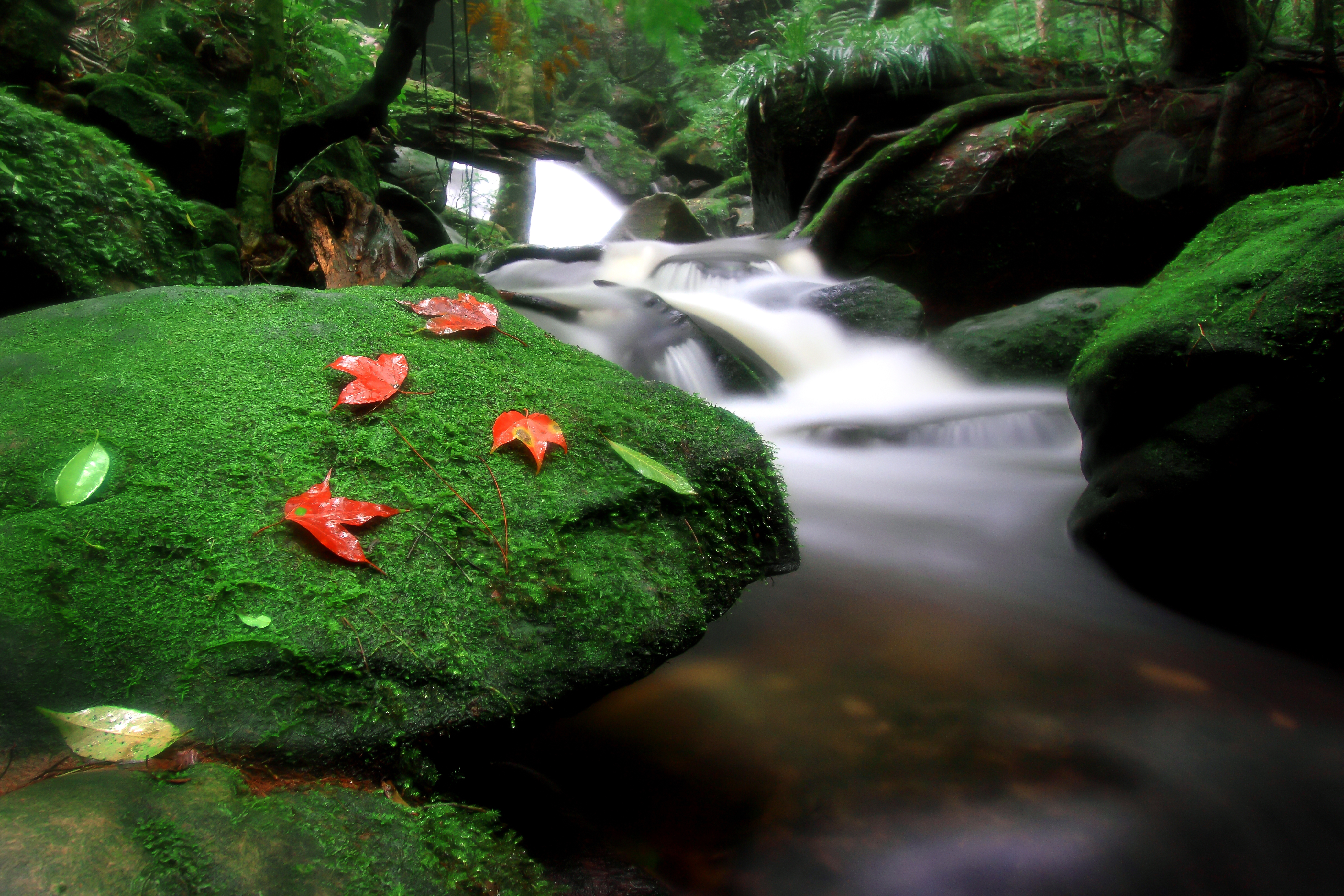 อุทยานแห่งชาติภูกระดึงได้รับการประกาศเป็นอุทยานแห่งชาติ ลำดับที่ 2 ของประเทศไทย เมื่อวันที่ 23 พฤศจิกายน 2505 ตั้งอยู่ในท้องที่ตำบลศรีฐาน อำเภอภูกระดึง จังหวัดเลย ครอบคลุมพื้นที่ 348.13 ตารางกิโลเมตร (217,576.25 ไร่) ลักษณะภูมิประเทศเป็นภูเขาหินทรายยอดตัด โดยมีที่ราบบนยอดภูกระดึงประมาณ 60 ตารางกิโลเมตร (37,500 ไร่) ภูกระดึงมีระดับความสูงอยู่ระหว่าง 400 – 1,200 เมตร จุดสูงสุดอยู่ที่บริเวณคอกเมย มีความสูง 1,316 เมตร สภาพทั่วไปของภูกระดึงประกอบไปด้วยพรรณไม้นานาชนิด พันธุ์สัตว์ป่านานาพันธุ์ หน้าผา ทุ่งหญ้า ลำธาร และน้ำตก อีกทั้งยังเป็นพื้นที่ต้นน้ำของลำน้ำพองซึ่งเป็นลำน้ำสายสำคัญสายหนึ่งของภาคตะวันออกเฉียงเหนือ ด้วยความสูง บรรยากาศ และสภาพอากาศที่เย็นสบายตลอดปีบนยอดภูกระดึง โดยเฉพาะในช่วงฤดูหนาวอุณหภูมิอาจลดต่ำจนถึง 0 องศาเซลเซียส จึงเป็นแรงจูงใจให้นักท่องเที่ยวปรารถนาที่หวังจะเป็นผู้พิชิตยอดภูกระดึงสักครั้งหนึ่งในชีวิต